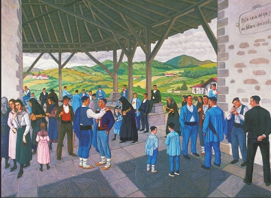 “Ohitura-erakustaldia”, Jose Arrue